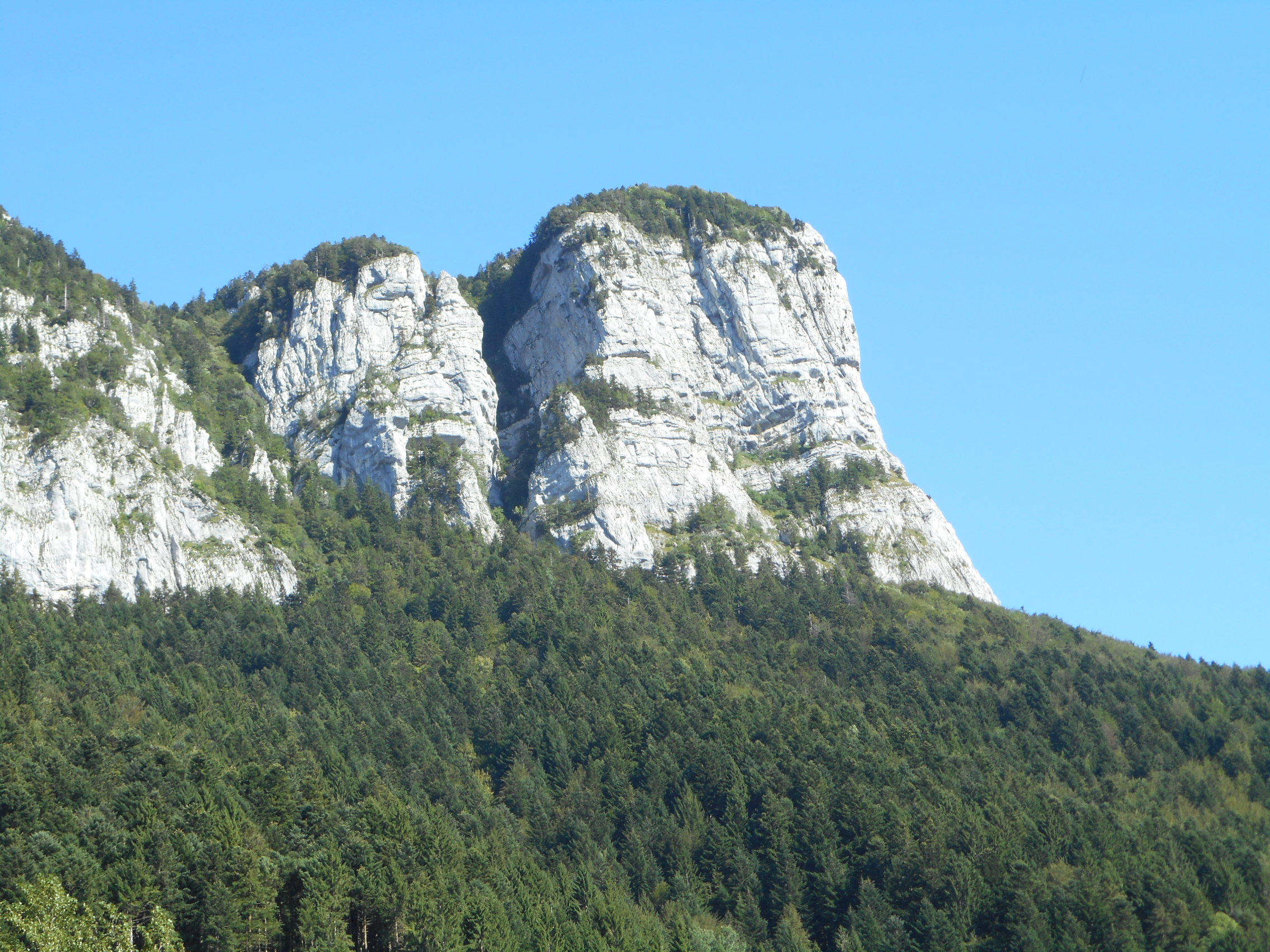 Roche Veyrand, prise en pleine journée depuis la vallée de Corbel.